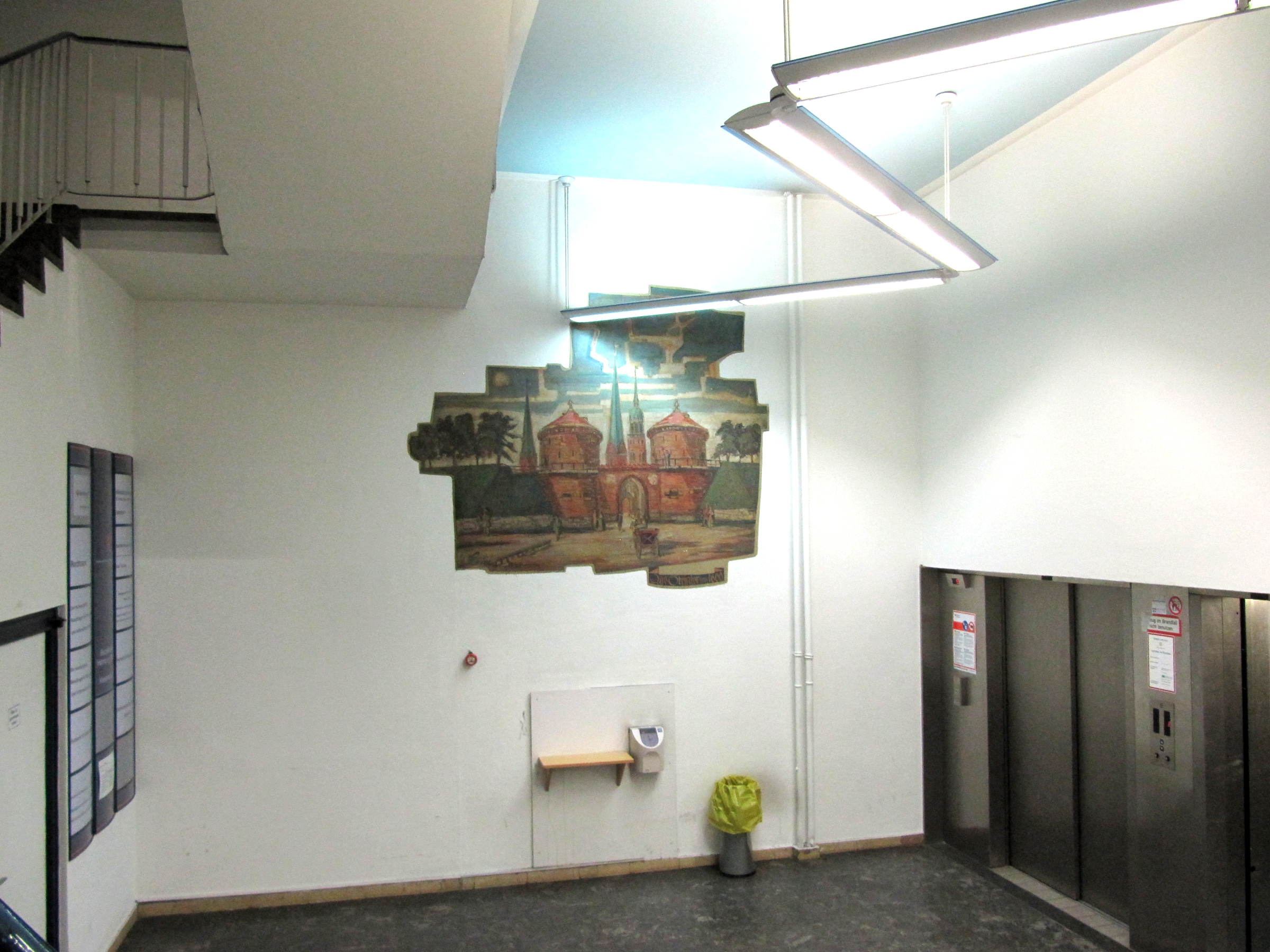 Wandmalereien des Künstlers "Reimer" (1956/1957) in den Foyers der City-Hof-Hochhäusern A, B und C, Klosterwall, Hamburg (15. Dezember 2015).